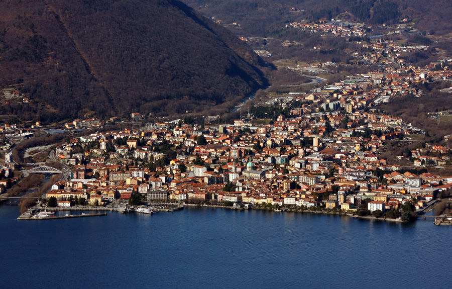 Veduta dell'abitato di Intra (Verbania) dal Poggio S. Elsa sopra Laveno (VA)